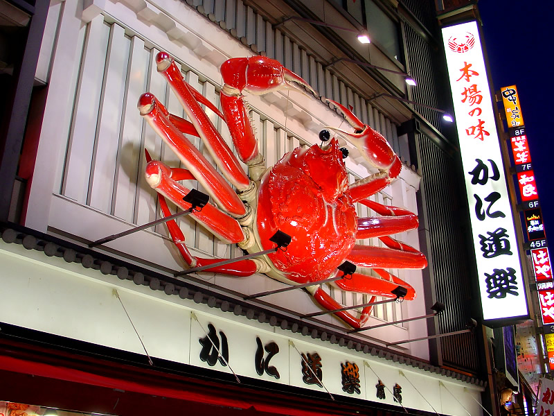 Kani-Douraku, Head Store.(Chuo Ward, Osaka City, Osaka Prefecture, Japan)